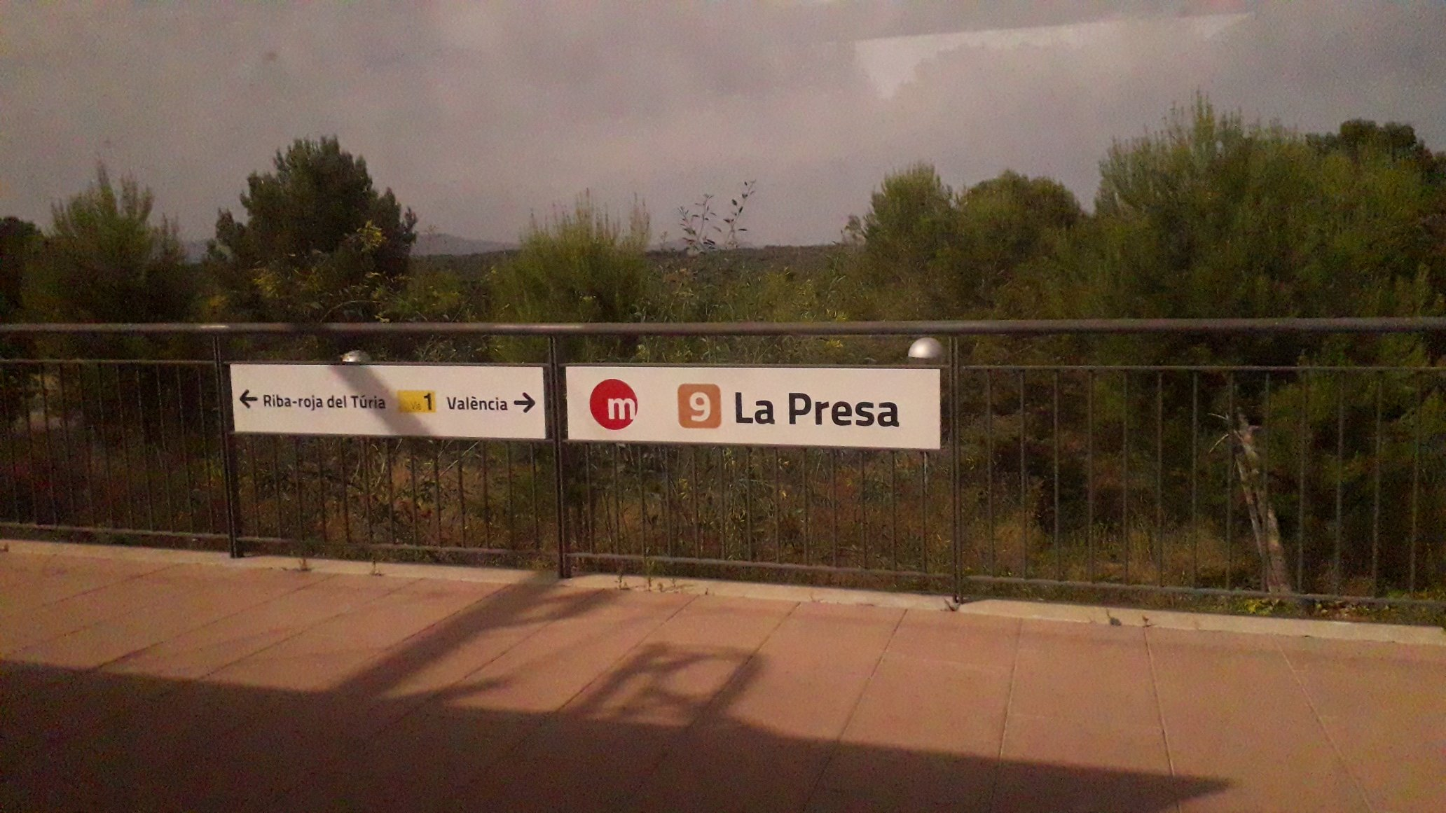 Estación de metro en Valencia, España